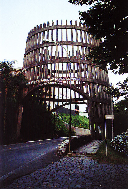 Entrée de Bento Gonçalves, "Vous pénétrez ici dans le monde du vin"